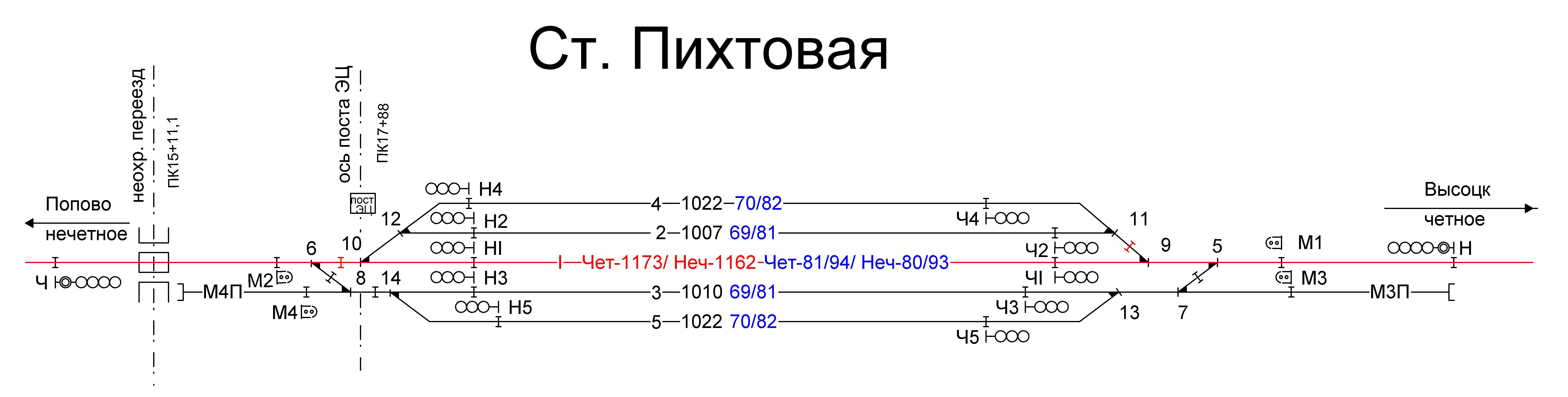 Пихтовая